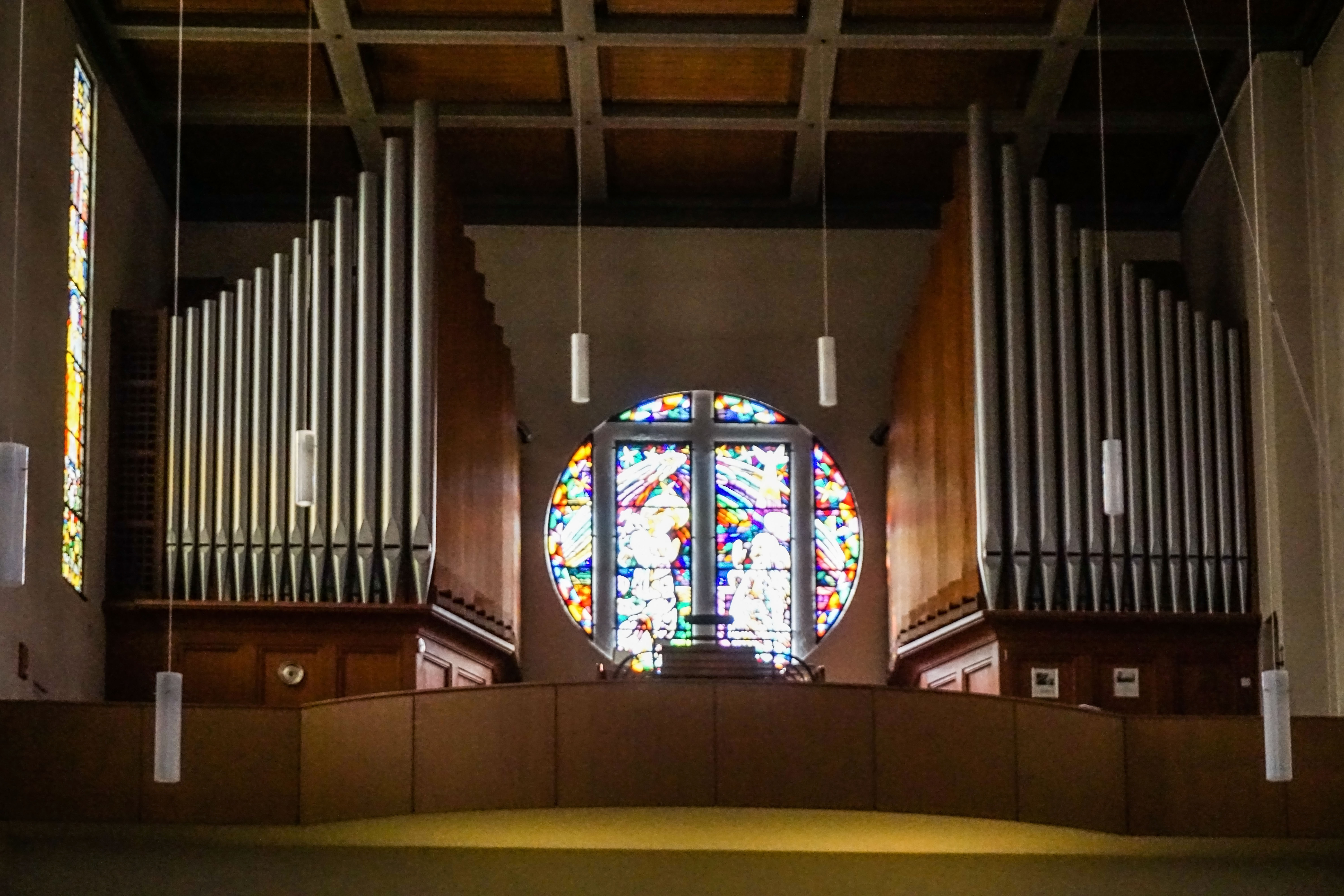 Hauptorgel und Westrosette